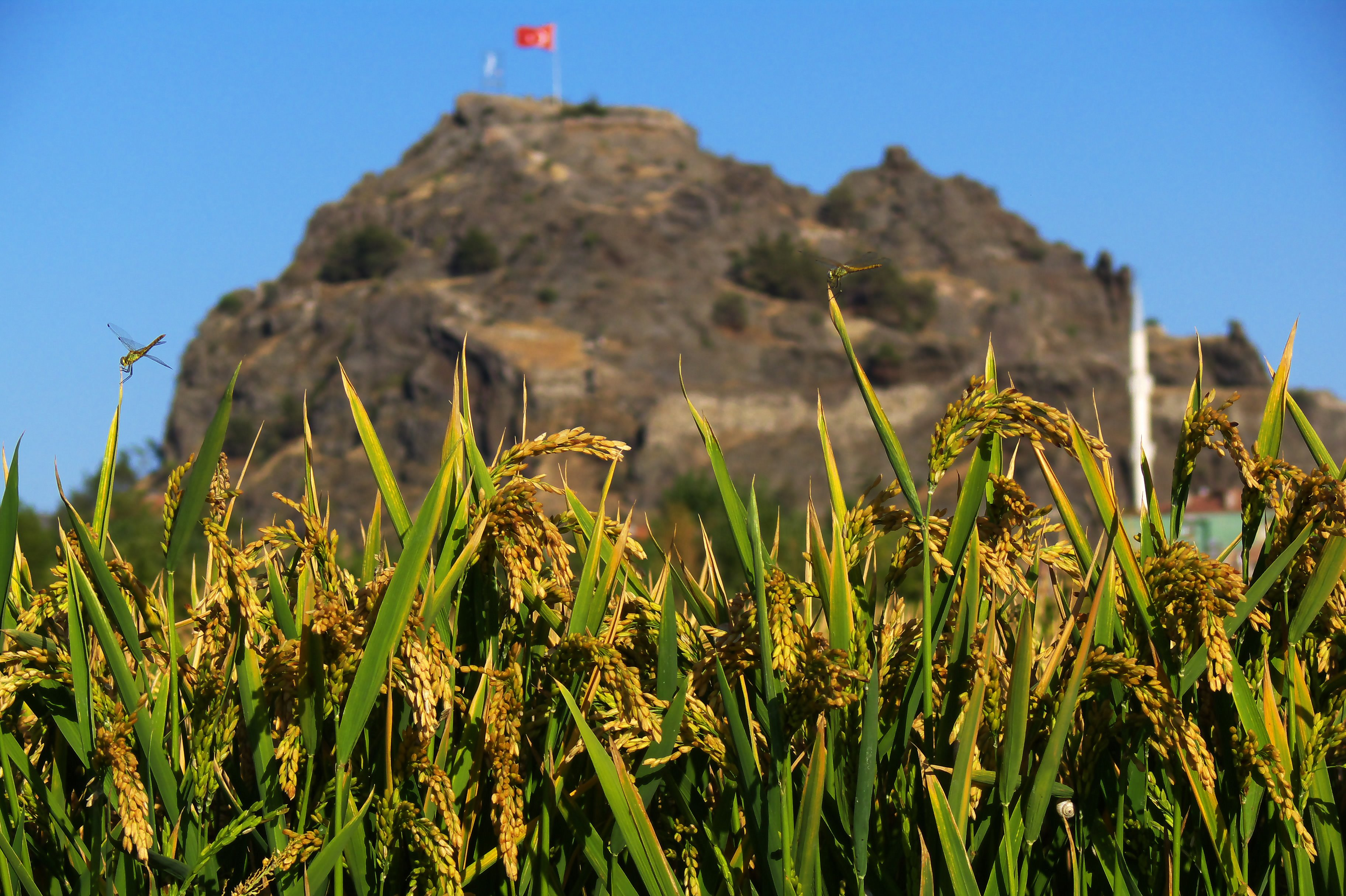 Osmancık Çeltik Tarlasından Görünüm